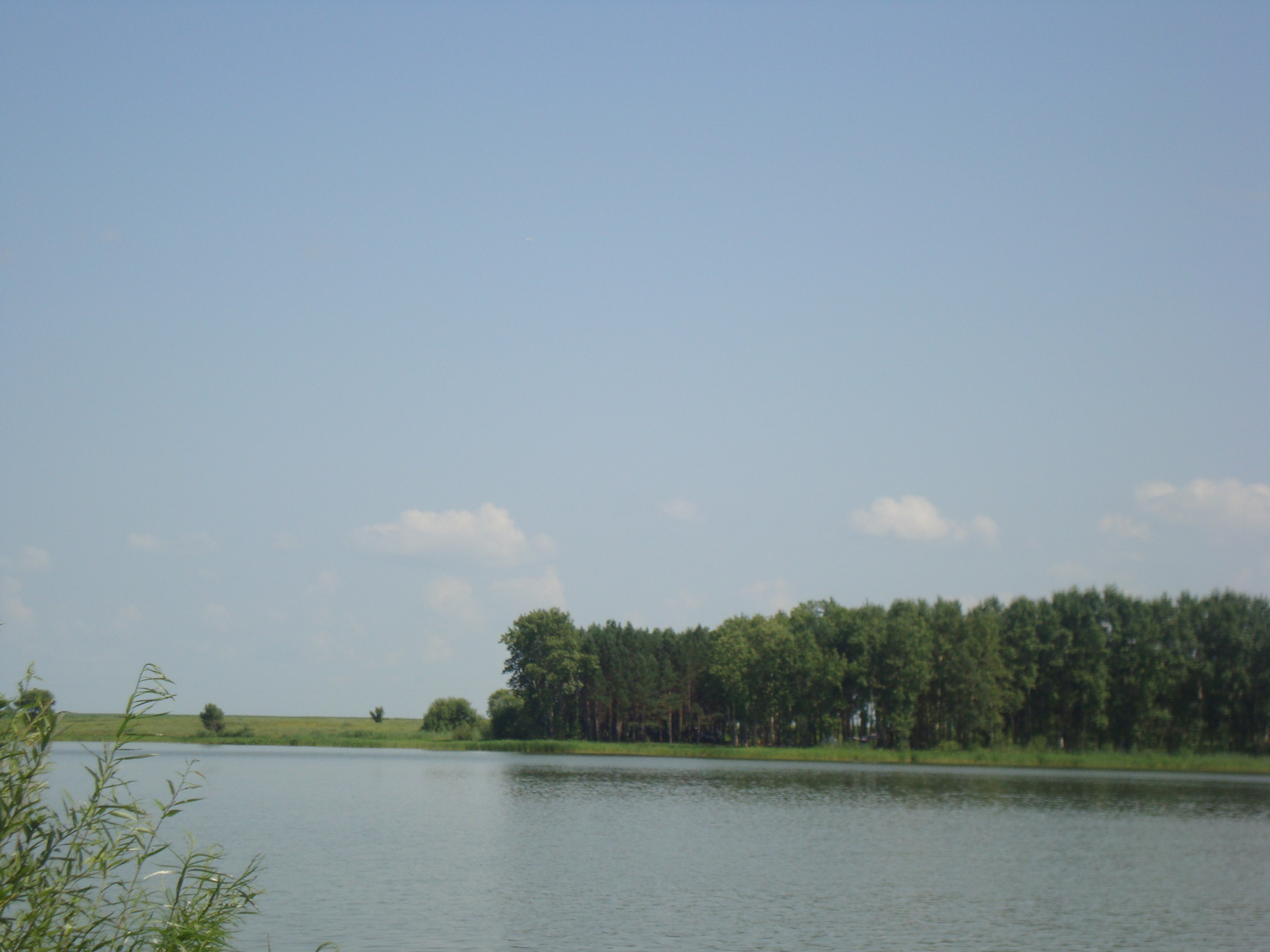 Грибское водохранилище: С. Грибское,Благовещенский район, Амурская область This image is related to the protected area of Russia number 2820039